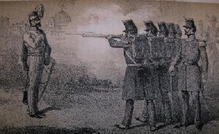 Grabado que representa el fusilamiento del teniente general Diego de León, conde de Belascoain (1807-1841). Destacó por su valor en la Primera Guerra Carlista y fue fusilado el día 15 de octubre de 1841 en Madrid por haber asaltado el Palacio Real de Madrid e intentar secuestrar a la reina Isabel II de España, durante la Regencia de Baldomero Espartero.